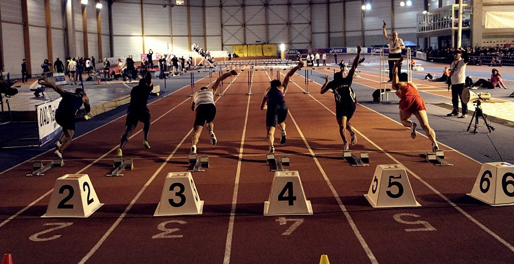 Départ du 60m haies, Meeting des Sacres - 2016